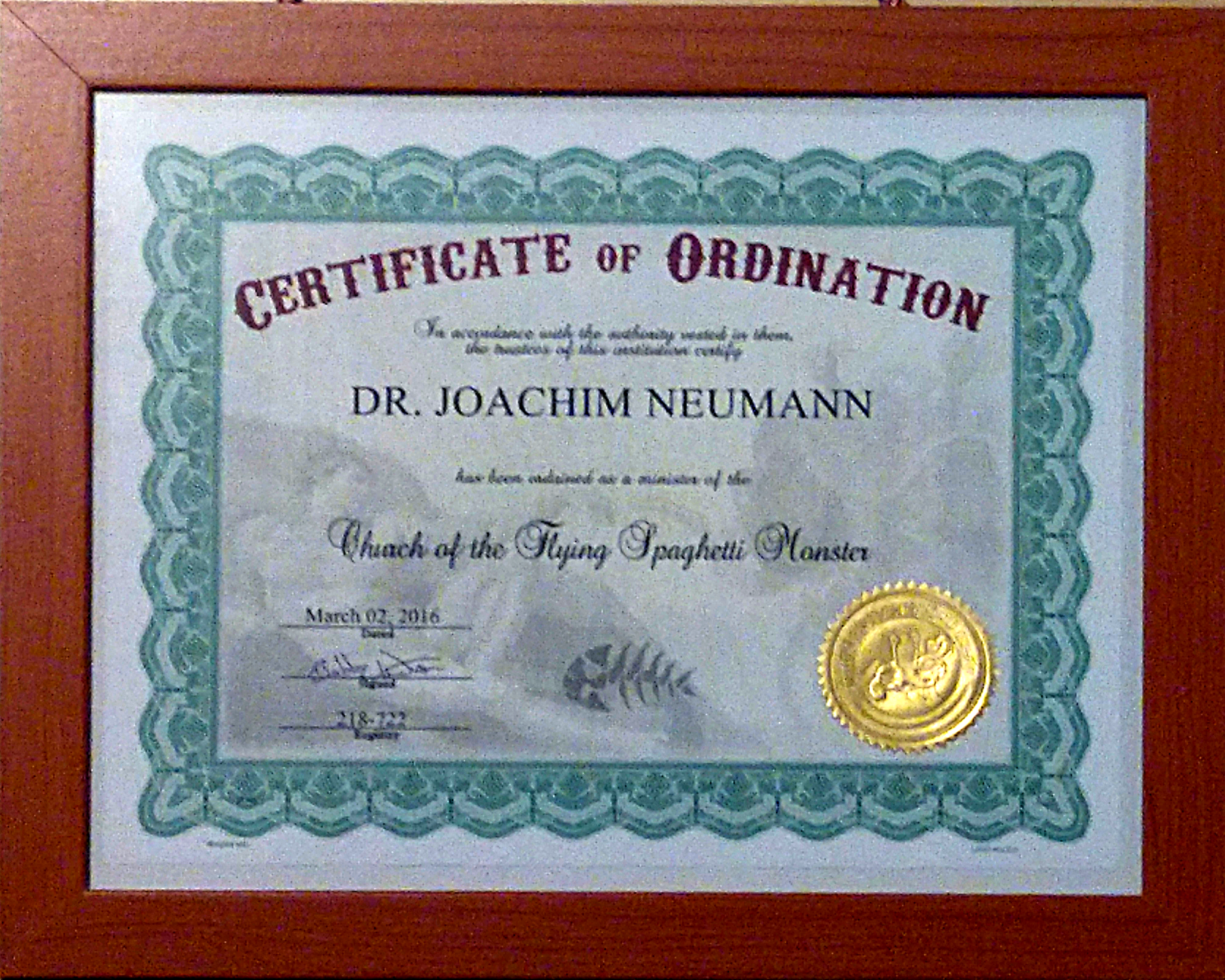 Fotografia d'un certificat d'ordenació com a sacerdot